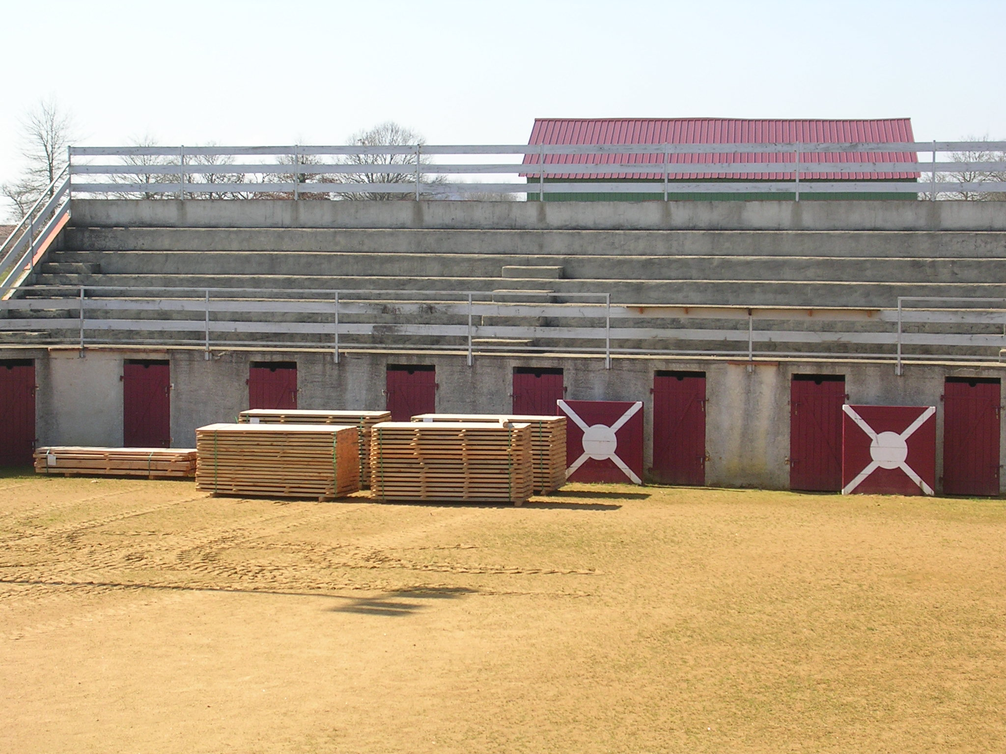 Arènes de Maurrin, dans le département français des Landes